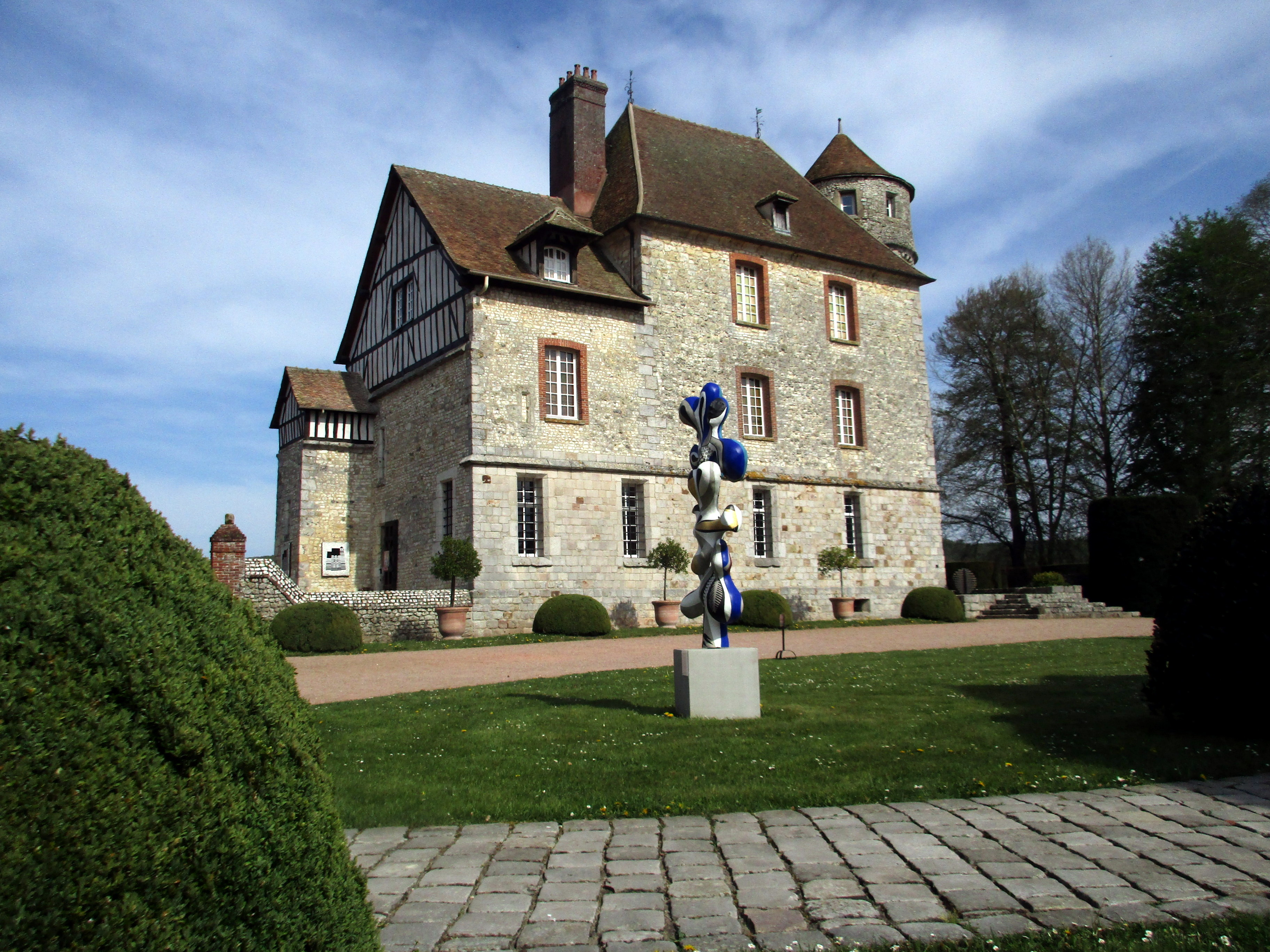 Vascœuil - Pâques 2019 - La façade